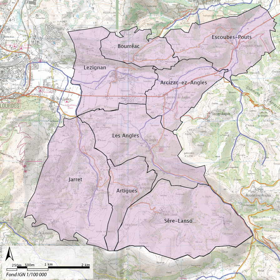 Cartographie de la Communauté de communes de la Baronnie des Angles établie sur un fond de carte